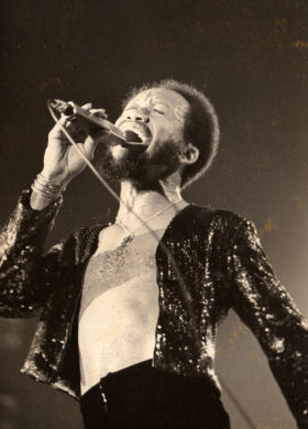 Maurice White under en konsert med Earth, Wind & Fire i München 1975.